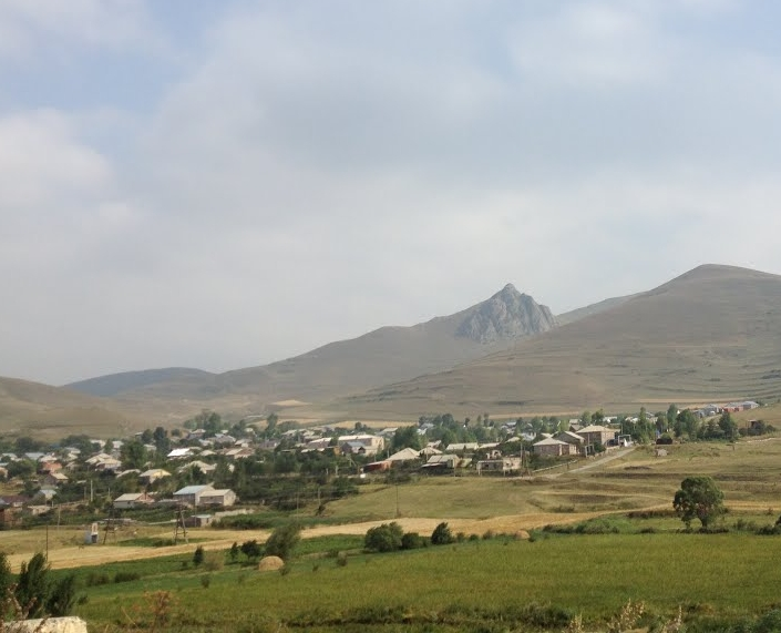 Село Гегасар